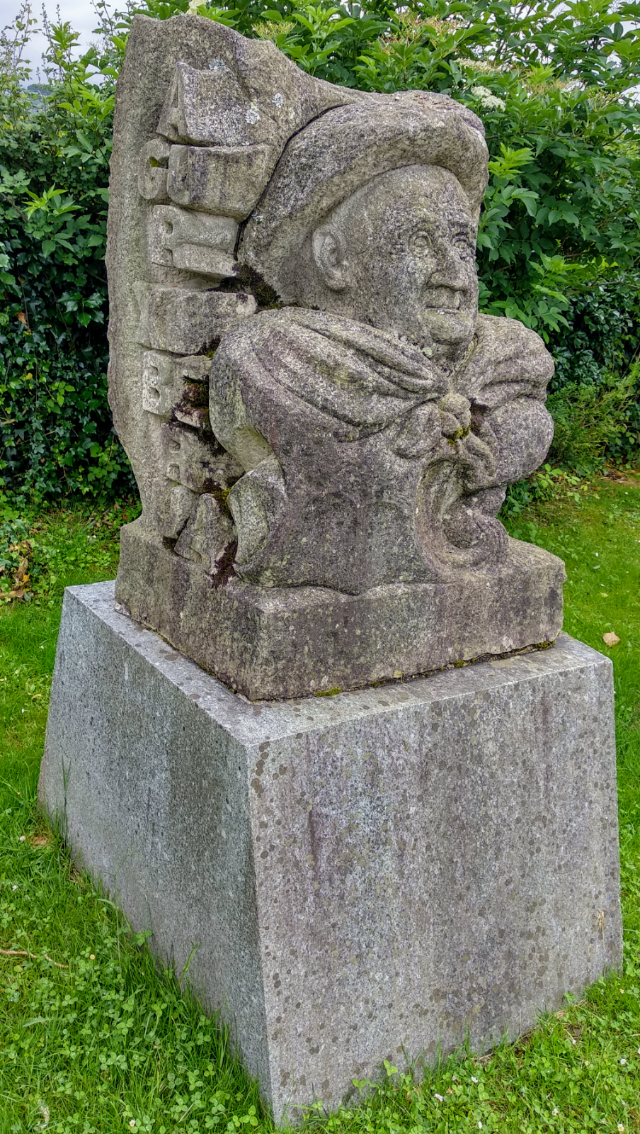 Etxahun Iruriren omenezko oroitarria.